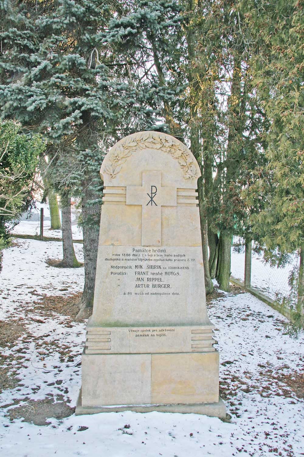 Pomník z Prusko-rakouské války roku 1866